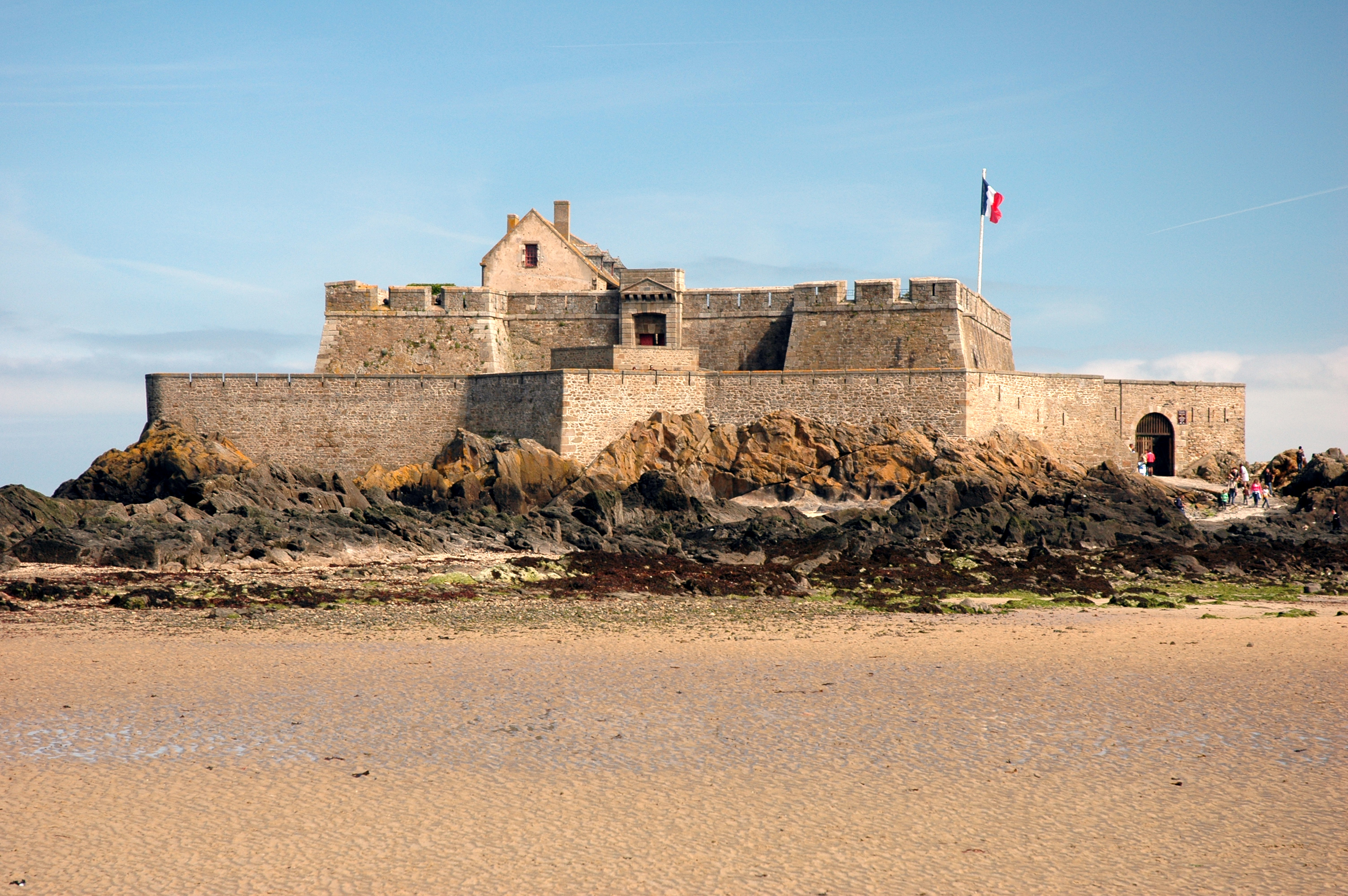 Fort National (Saint-Malo)